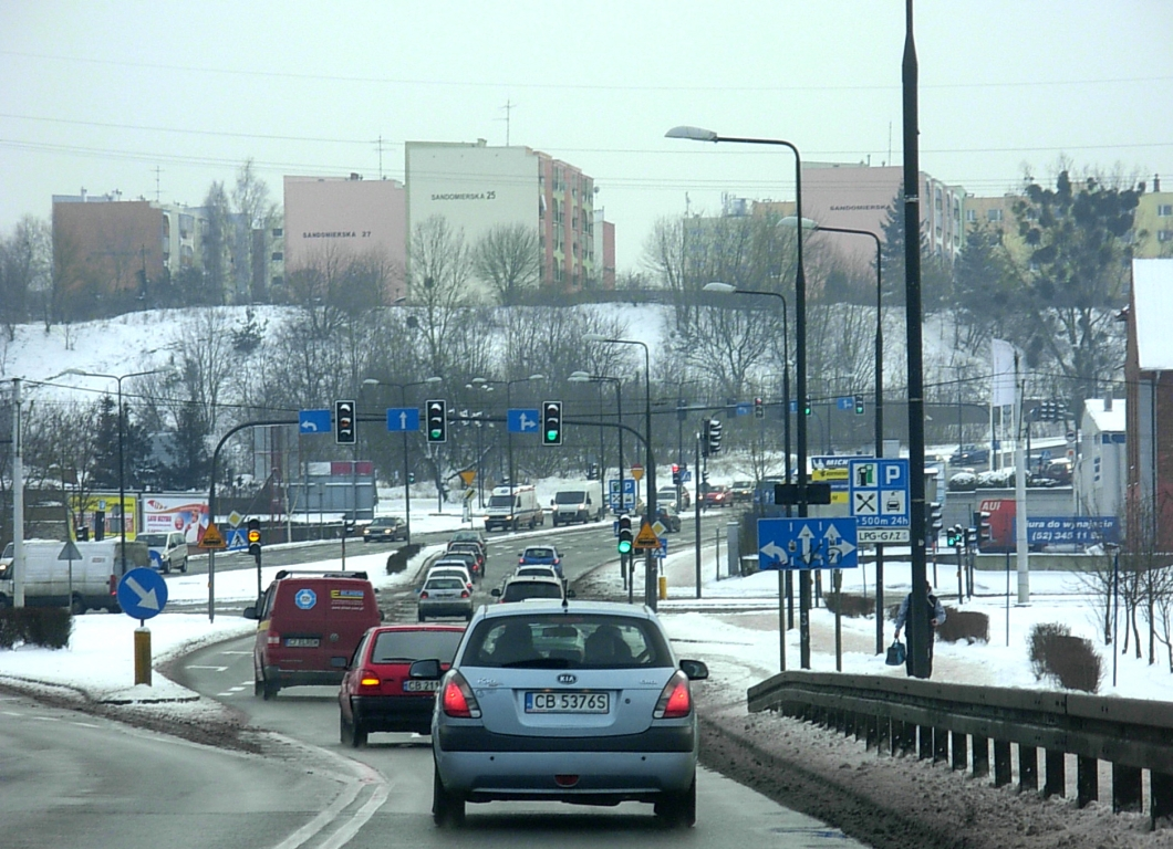 Zbocze Bydgoskie na Kapuściskach - widok z mostu Kazimierza Wlk